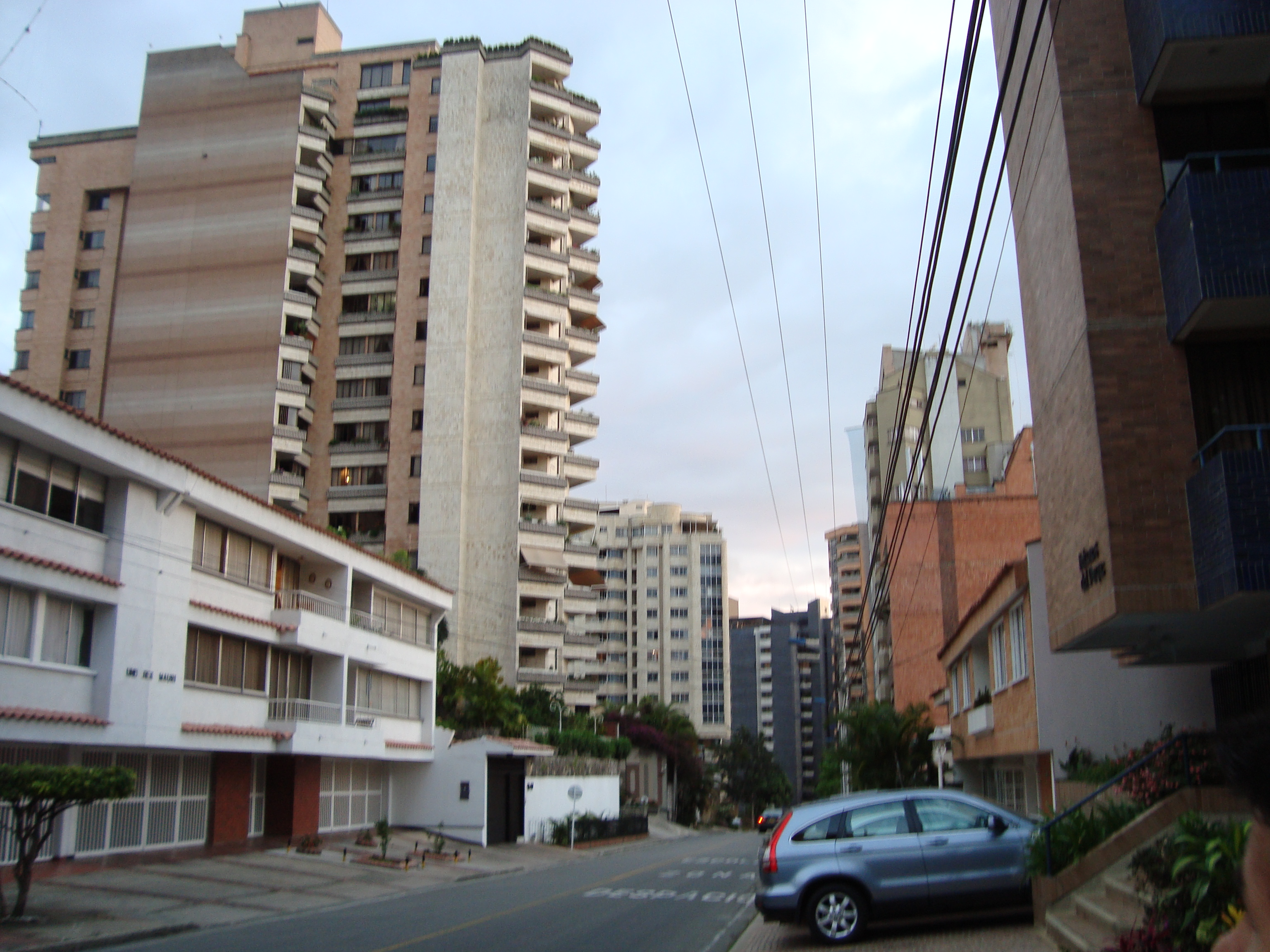 Calle del sector de cabecera bucaramanga